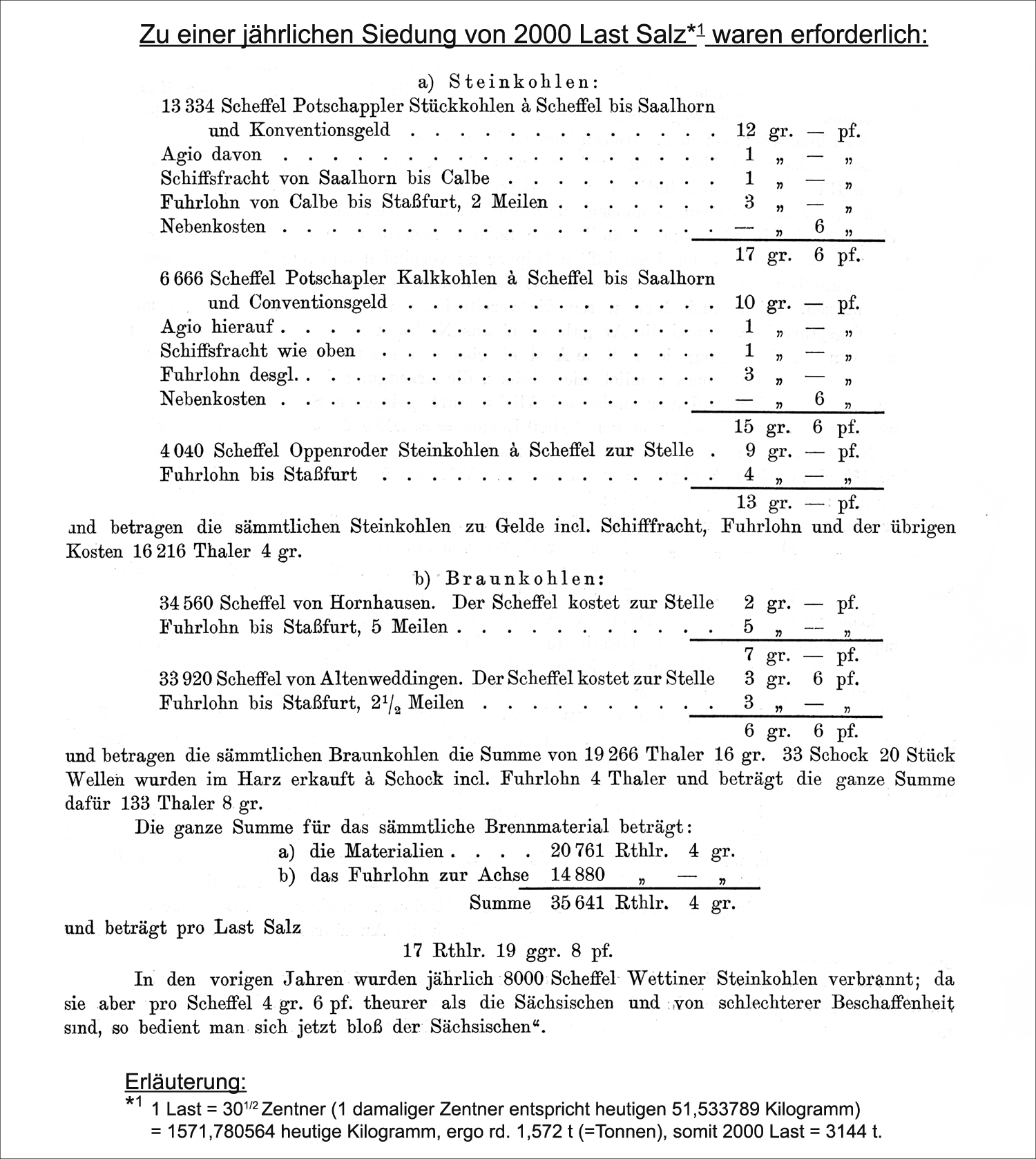 Brennstoffbedarf der Staßfurter Saline.